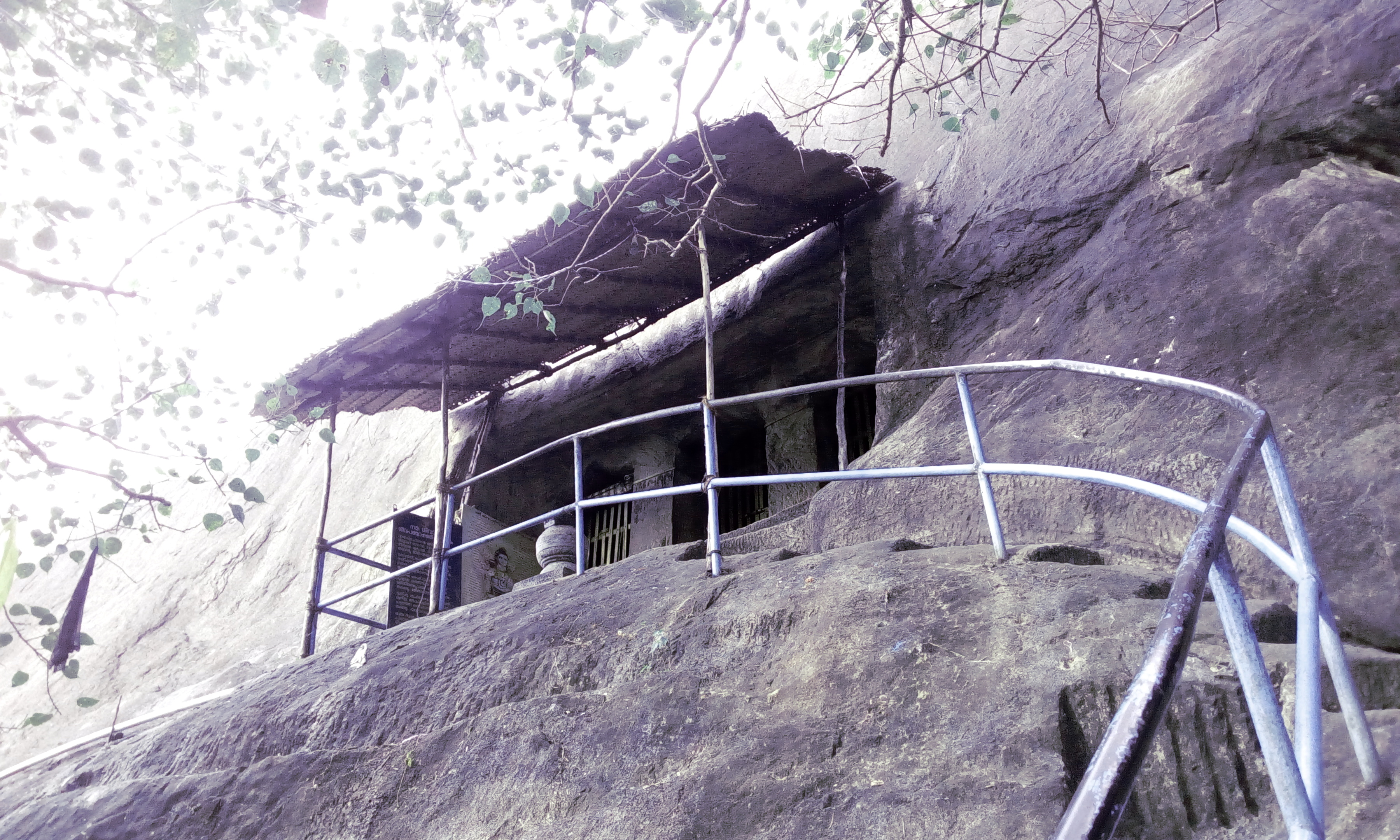 മടവൂർപ്പാറ ഗുഹാക്ഷേത്രം